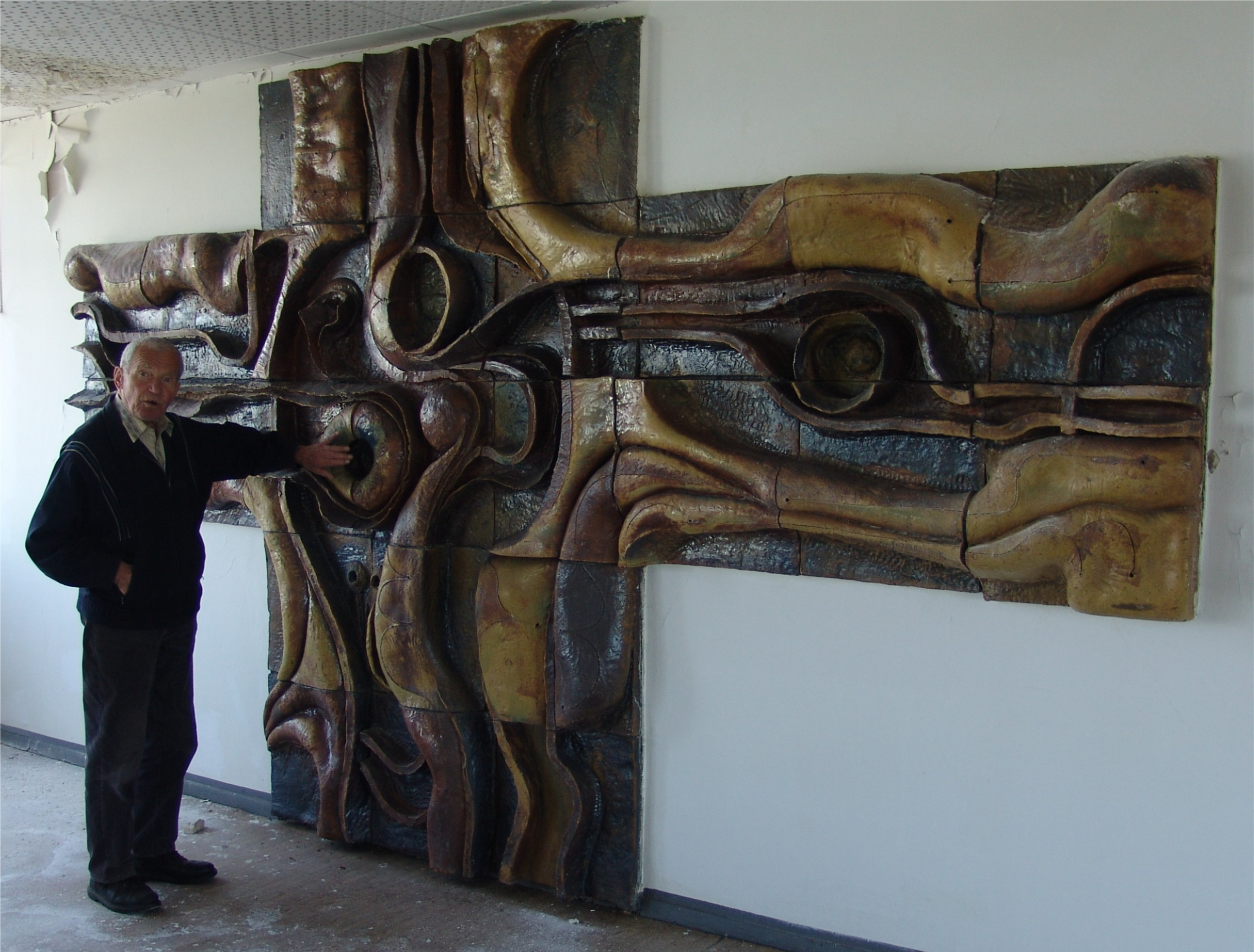 Keramikarbeit im Speisesaal der ehemaligen Fahrbereitschaft des MdI in Berlin, Siegfriedstraße, Berlin-Lichtenberg